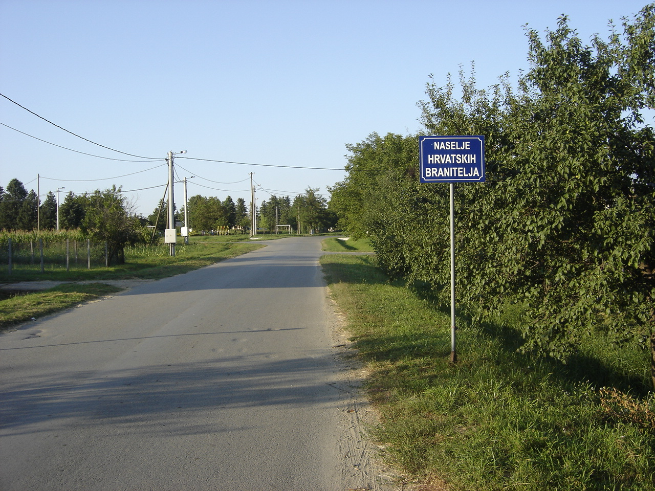 Naselje hrvatskih branitelja